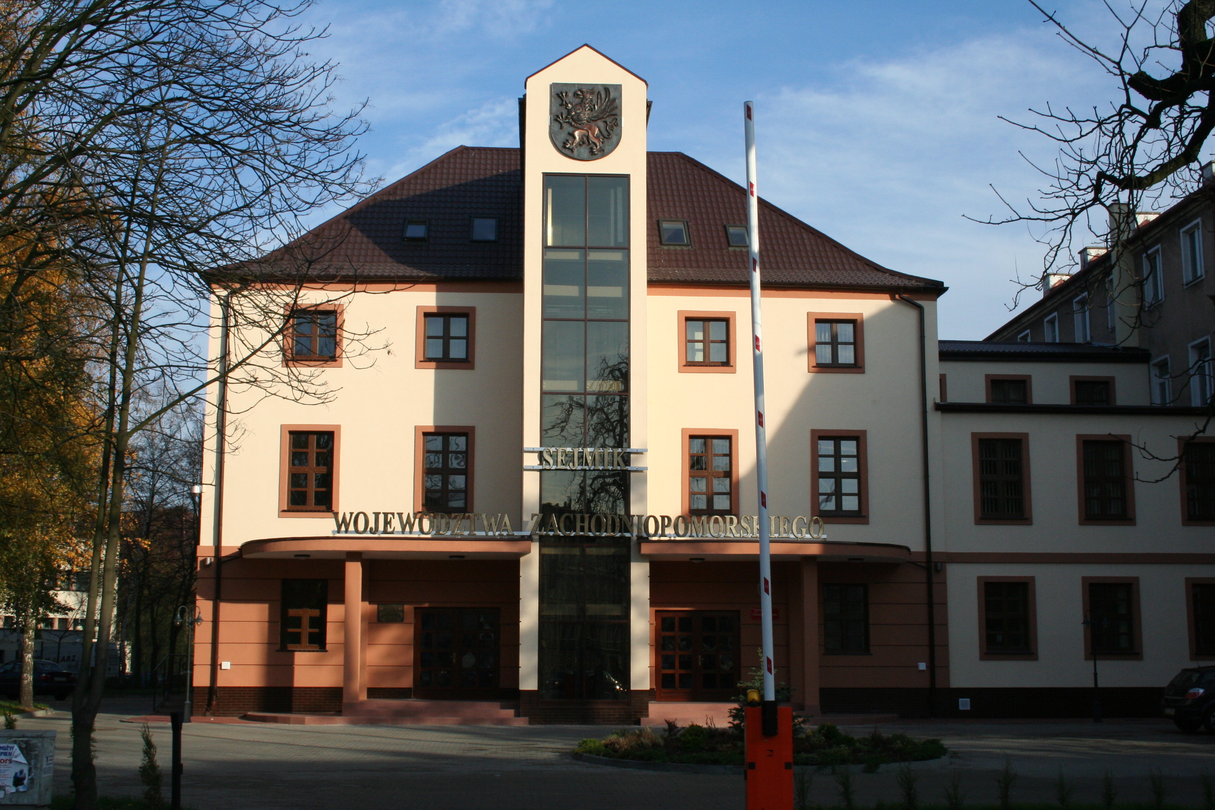 Budynek Sejmiku Województwa Zachodniopomorskiego w Szczecinie.